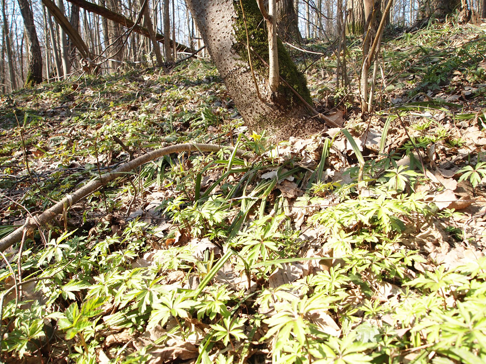 Валуевский лесопарк - дубрава на склоне, ковёр ветреницы лютичной